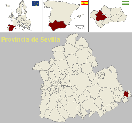 Mapa de localización del municipio sevillano de casariche (Andalucía, España)